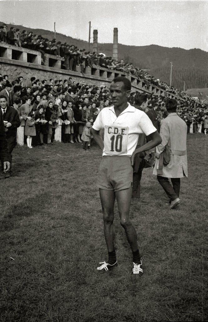 Título original: El etiope Mamo Wolde 'Gacela Negra' en el cross de Elgoibar (1/2) Localización: Elgóibar (Guipúzcoa)